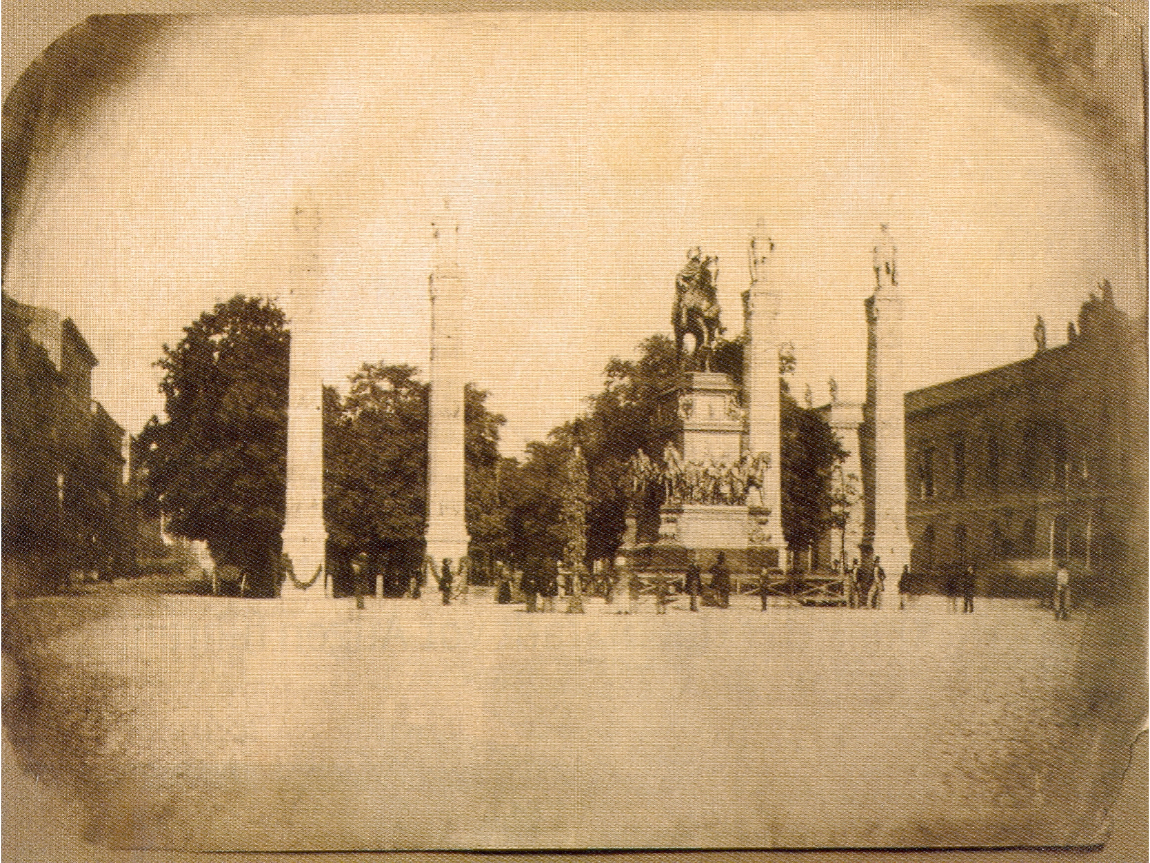 Reiterstandbild Friedrichs des Großen Unter den Linden in Berlin bei der Einweihung am 31. Mai 1851. Älteste bekannte Berlin-Aufnahme auf Papier (laut mobil)